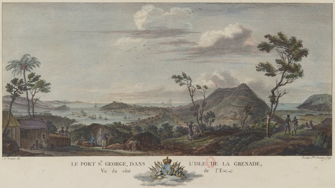 Estampe tirée des Nouvelles vues perspectives des ports de France, dessinées pour le Roi par M. Ozanne. 1776.